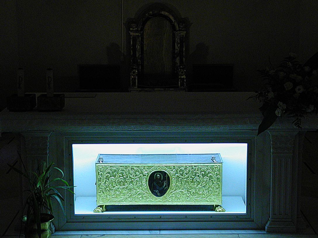 San Tommaso di Ortona